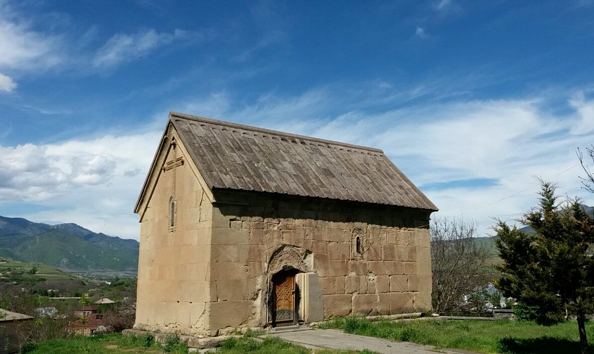 საყუნეთის ეკლესია